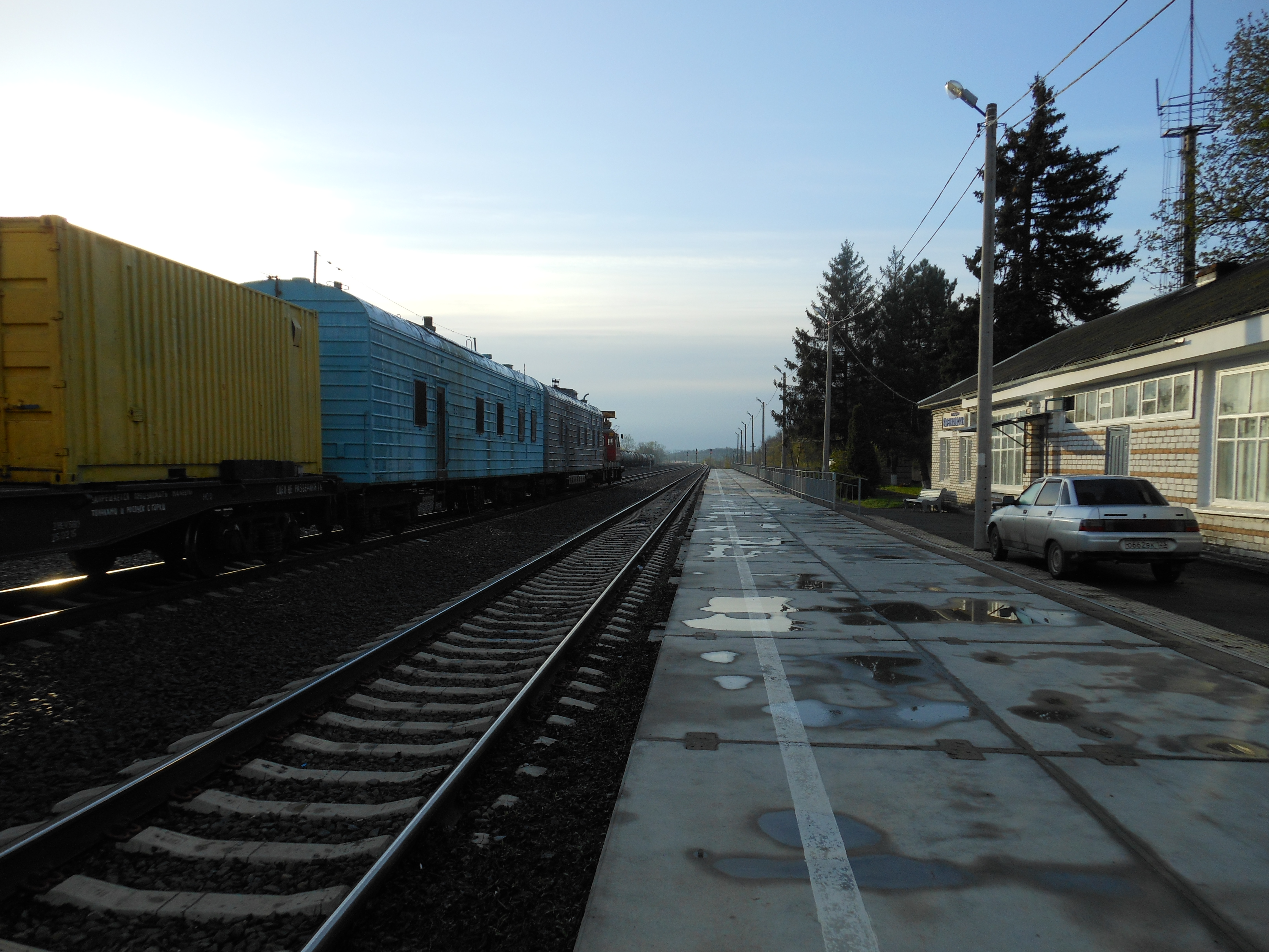 Перрон железнодорожной станции Варениковская